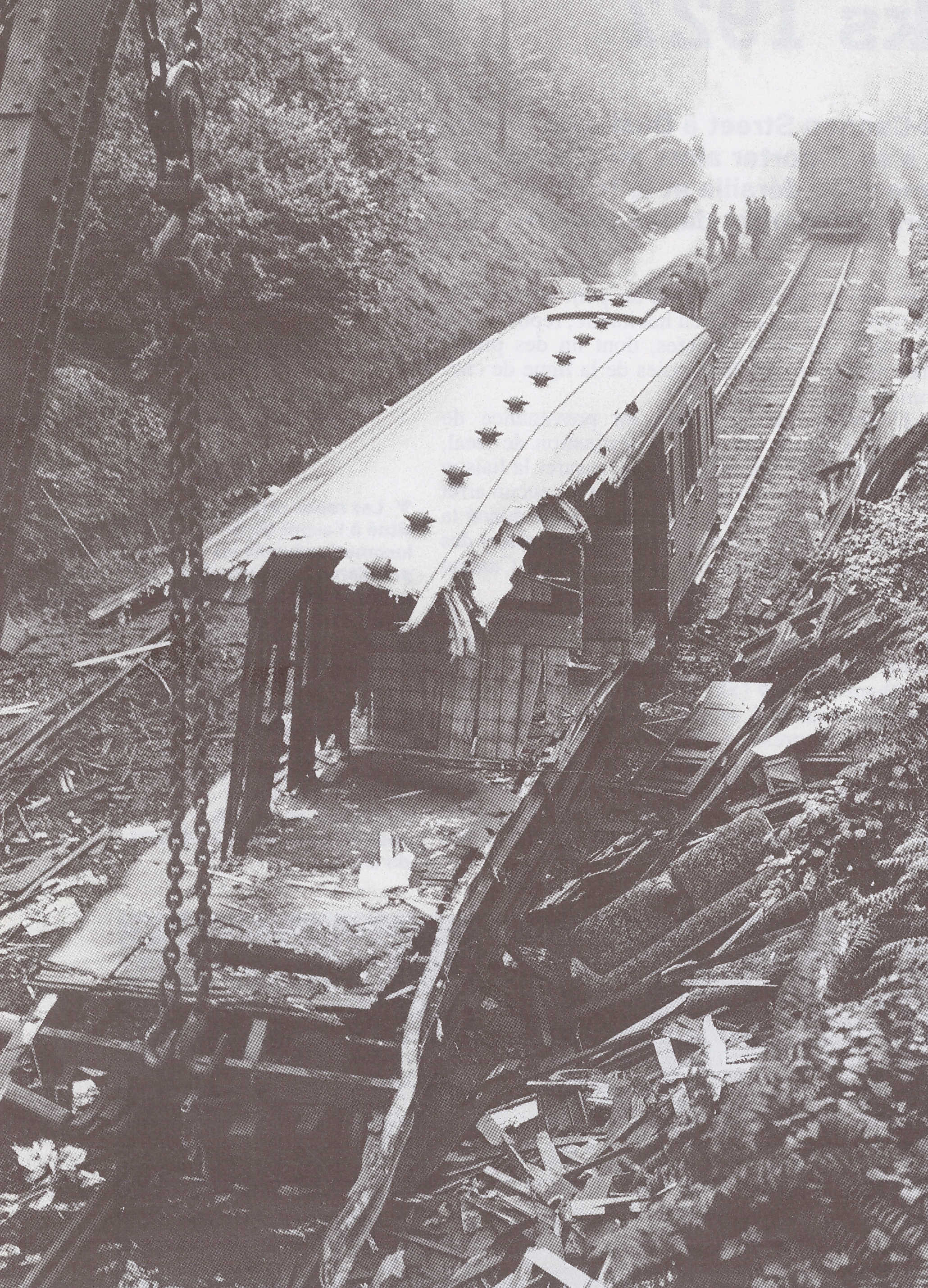 Accident ferroviaire de Sevenoaks du 24 août 1927 / Une des trois premières voitures détruites .